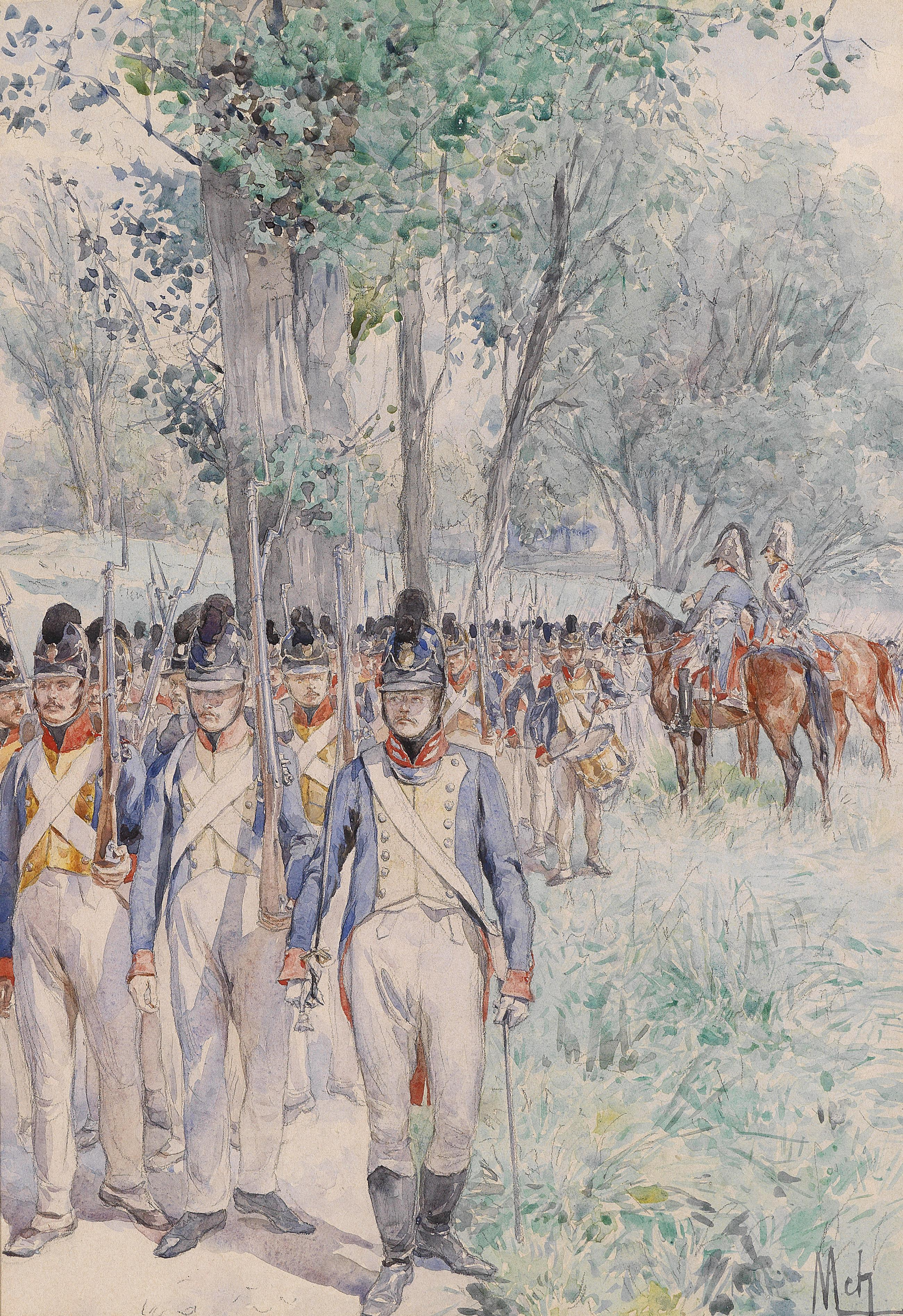 Regiment, marschierend